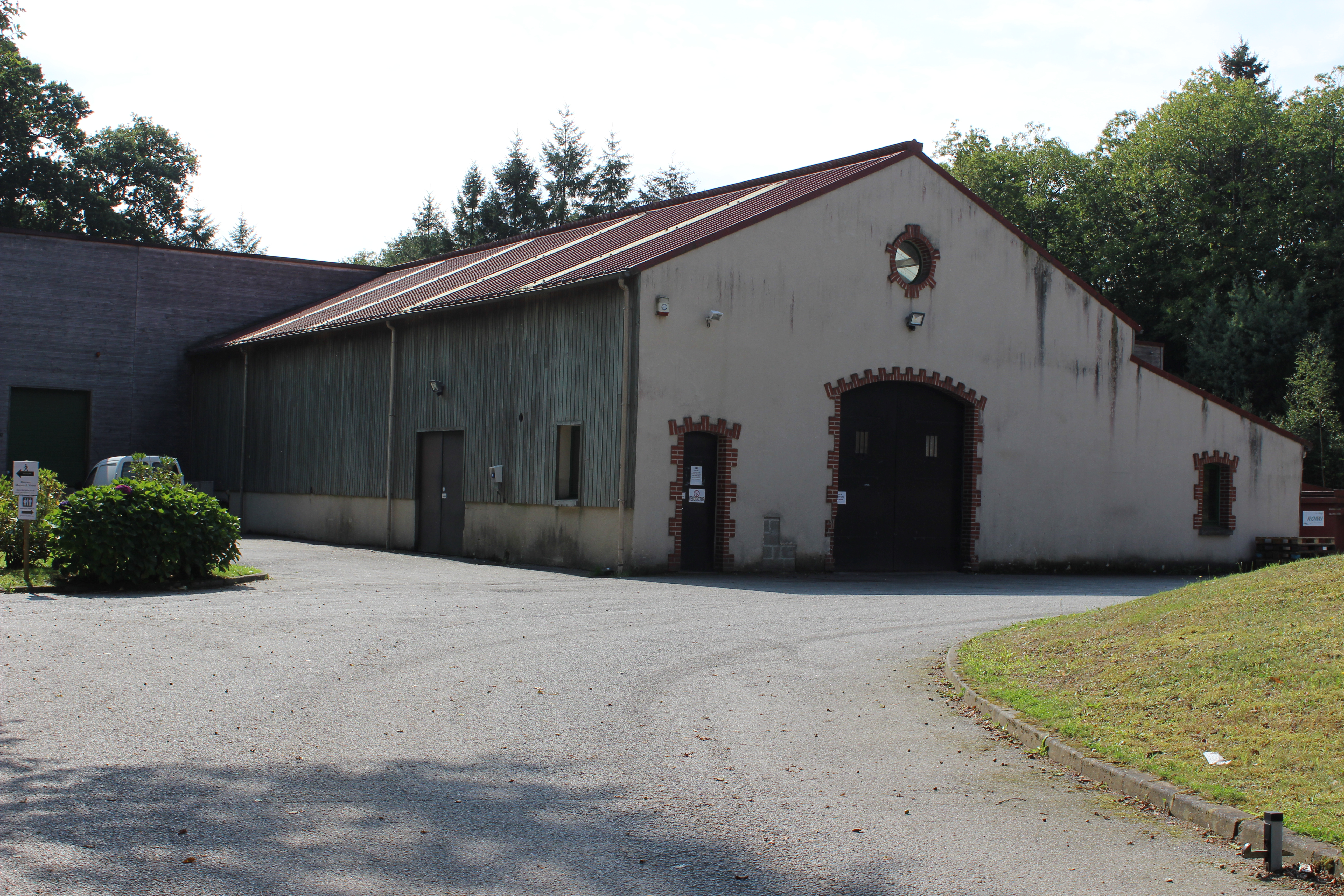 Brasserie Lancelot -Wiki takes josselin 2015